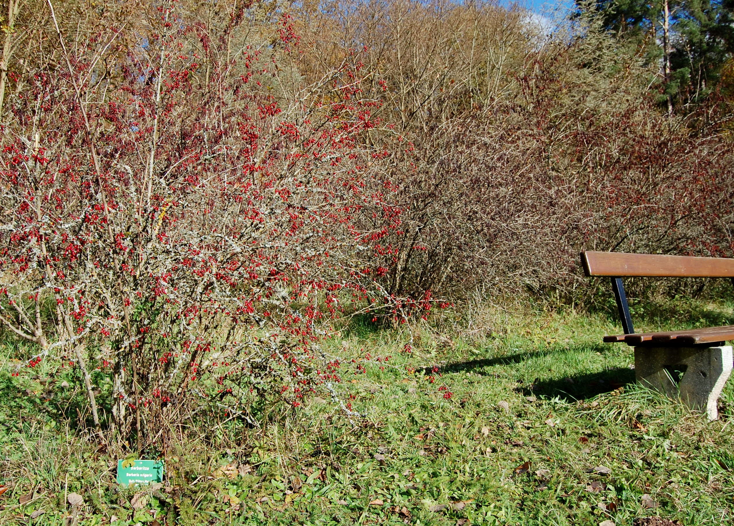 Eine Berberitze mitten im Duftwald von Bad Kissingen